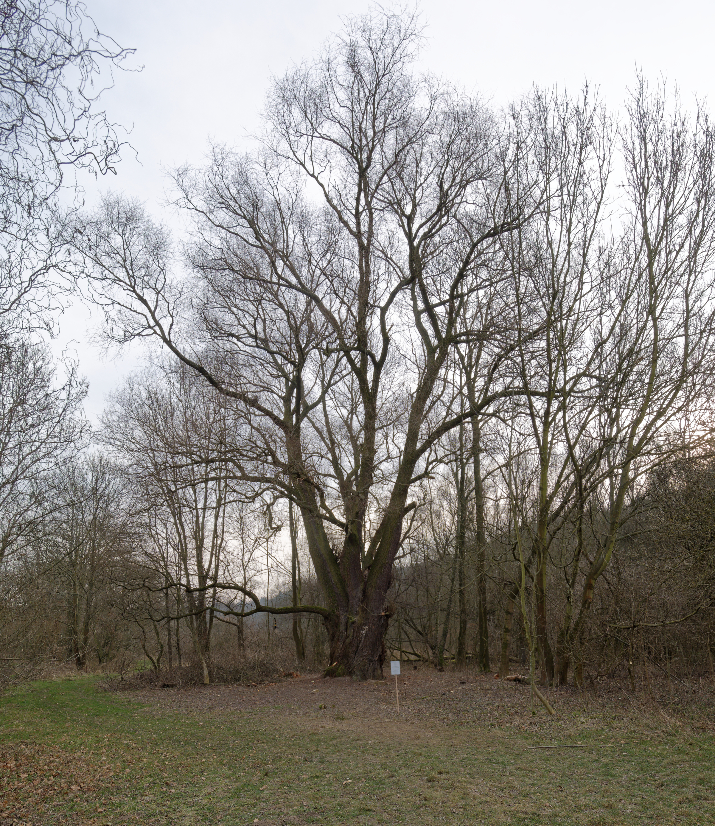 "Vrba zapomenutá", významný strom, Praha - Suchdol